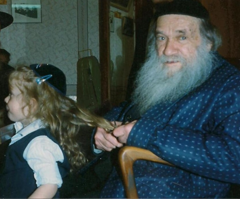 אברהם דוד רוזנטל היה פוסק, דיין וראש בית דין בבית דין צדק אשכנזים פרושים בירושלים ורב שכונת שערי חסד.